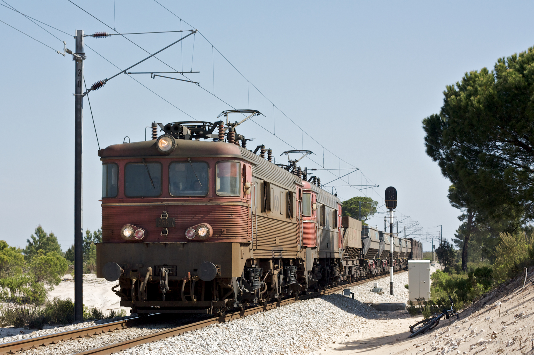 Tipo: Comboio de Transporte de Areia 96211 [Ramal Somincor - Loulé] Local: Estação da Somincor [Linha do Sul, PK 92] Data e hora: 1 de Abril de 2009 [10h28] Material: Locomotivas 2560 e 2557 + 10 vagões (6 Transfesa Faoos e 4 CP Falls)